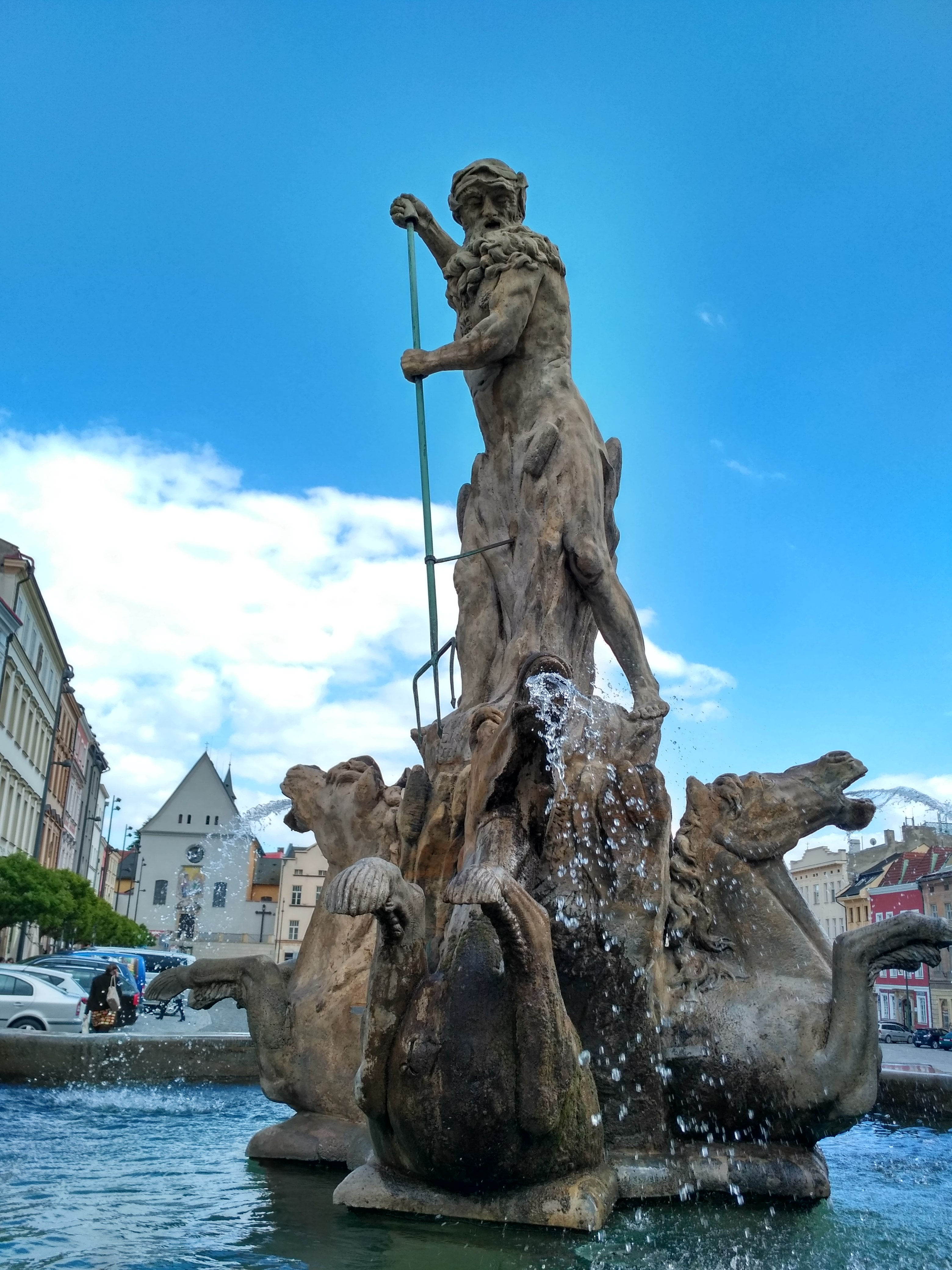 Neptunova kašna (Olomouc)